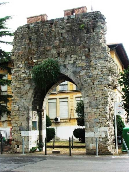 La Porta Buoza a Pisa nell'area dell'Ospedale Santa Chiara.